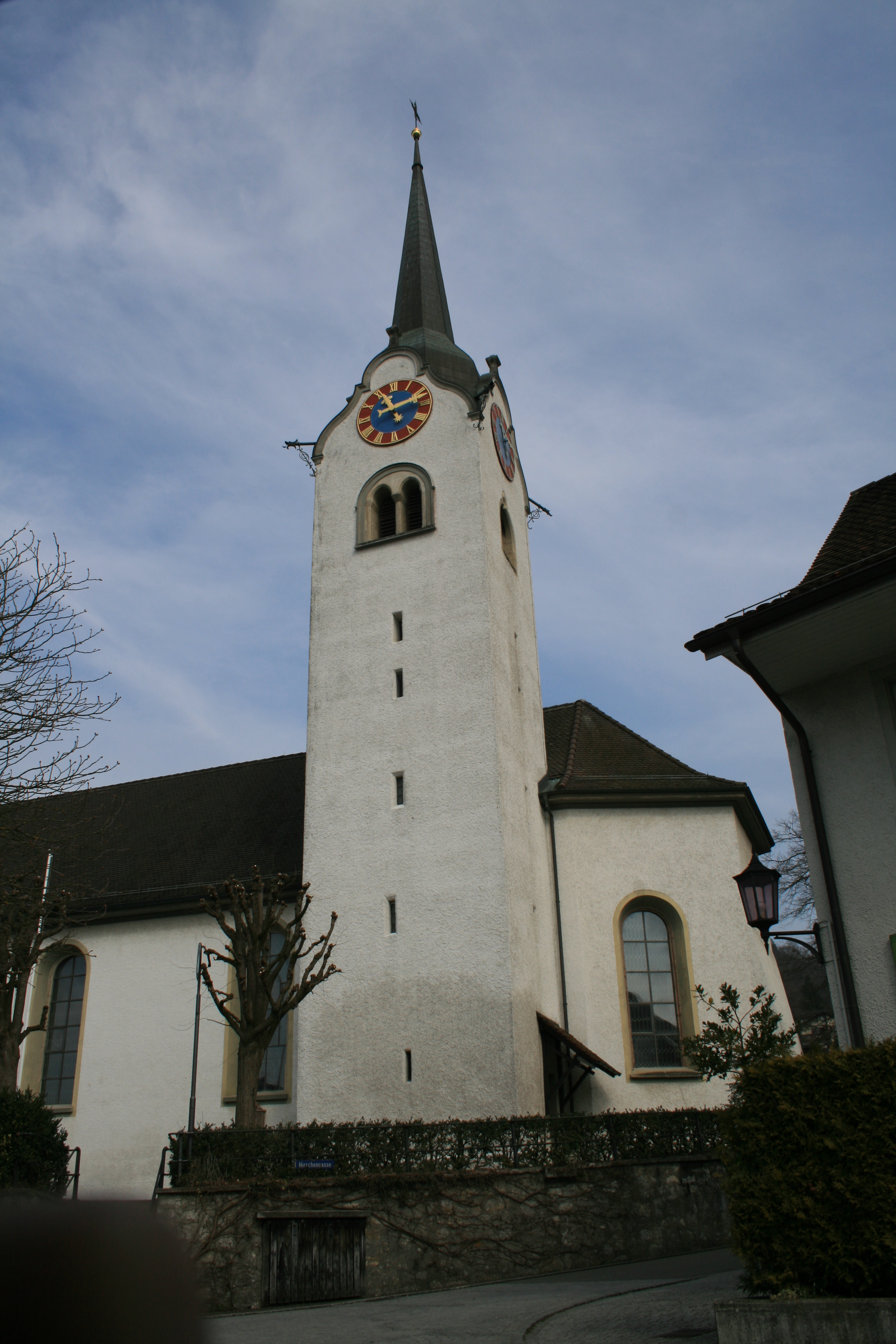 Kirche Kirchdorf, Obersiggenthal